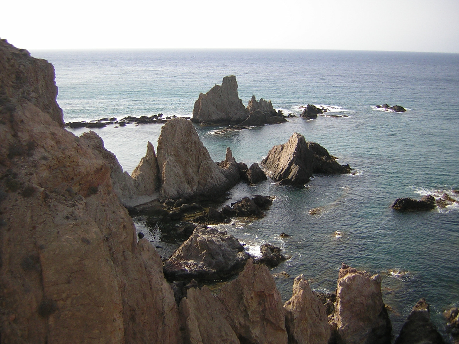 Escollos llamados las Sirenas, en Cabo de Gata